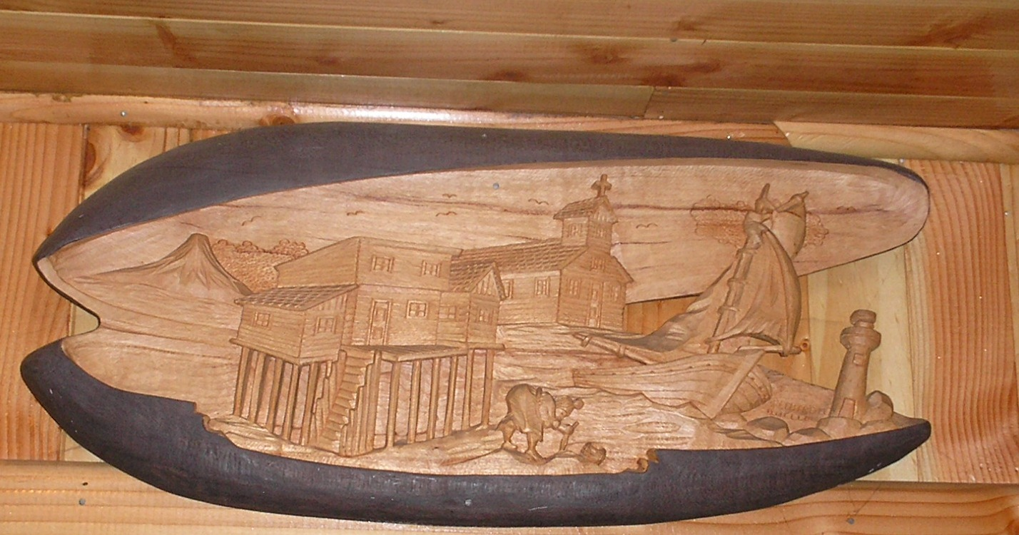 Escena marítima tallada en un tronco de ciruelillo. Hecho en Quellón, Chiloé